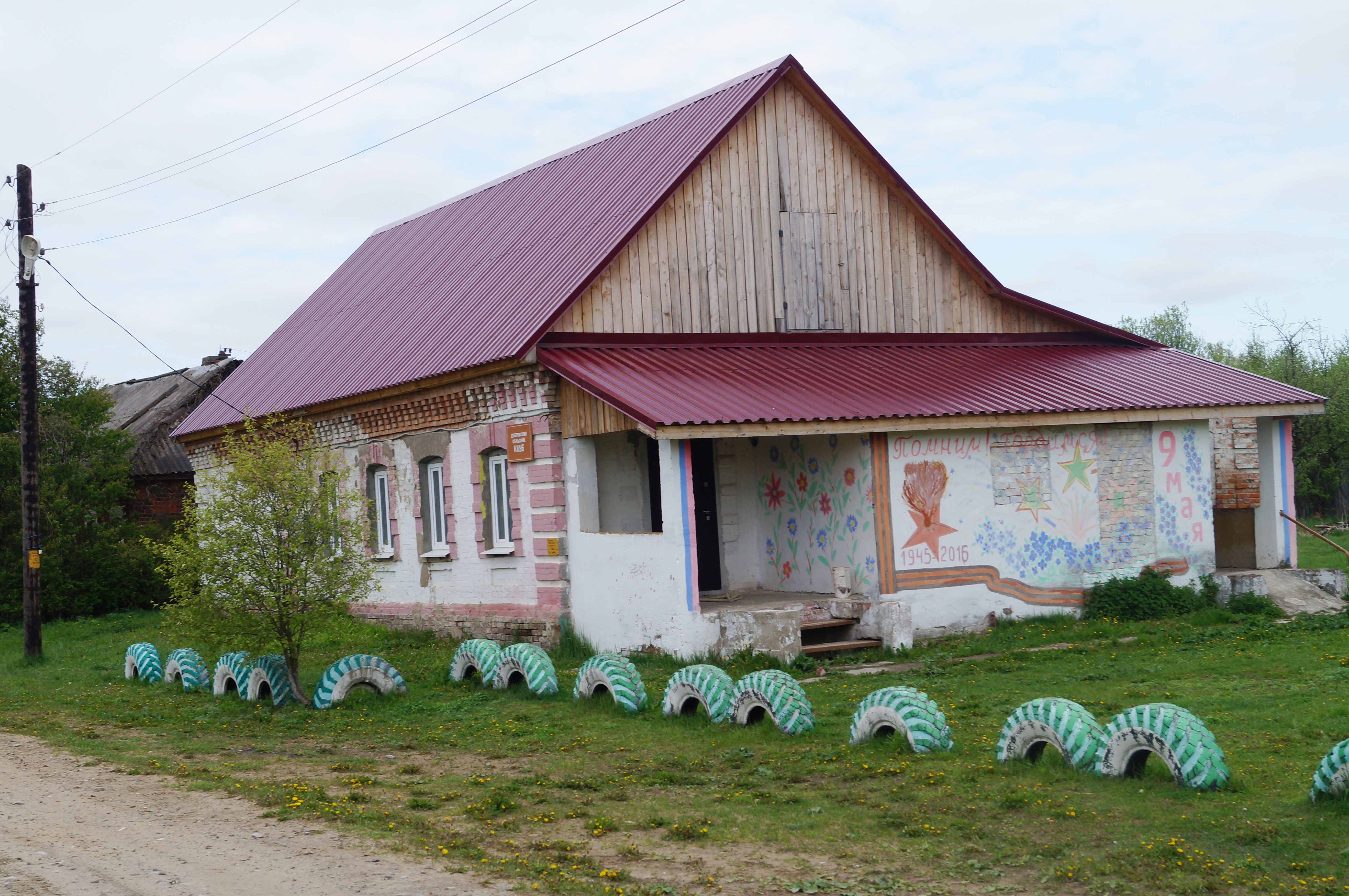 Дубровка (Думиничский район), сельский клуб